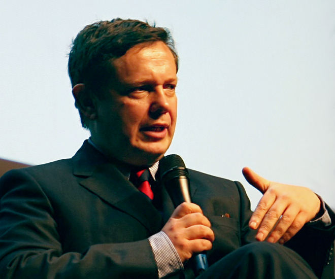 selbst am 3. Februar 2007 fotografiert und unter GNU-FDL gestellt